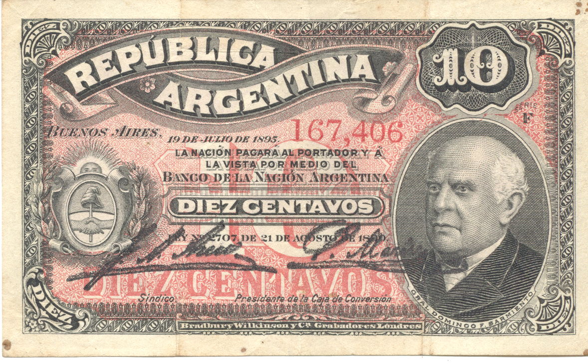 Anverso de un billete de 10 centavos -Peso Moneda Nacional- Argentina.